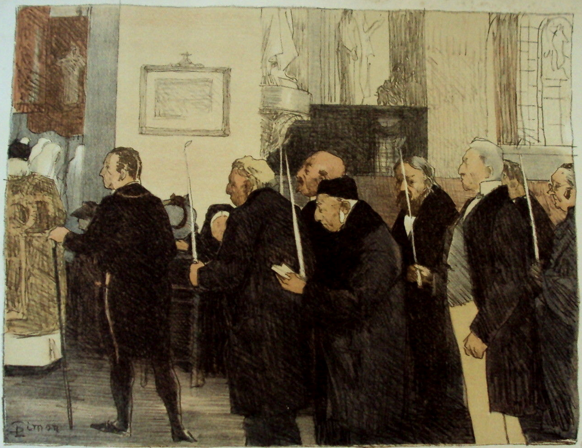 from L'Estampe moderne, vol. I, Paris, F. Champenois.